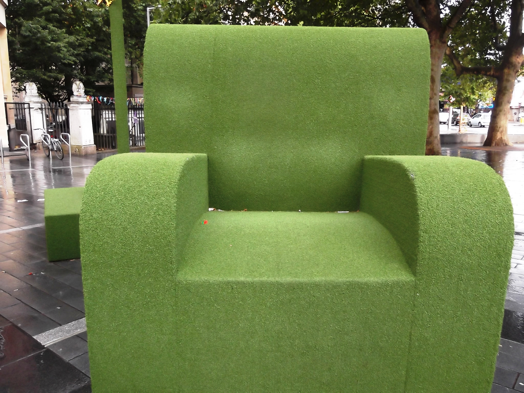 كرسي من الخضرة بالعاصمة الإنجليزية لندن.